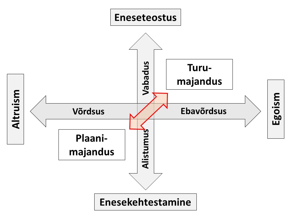 Segamajanduse illustratsioon